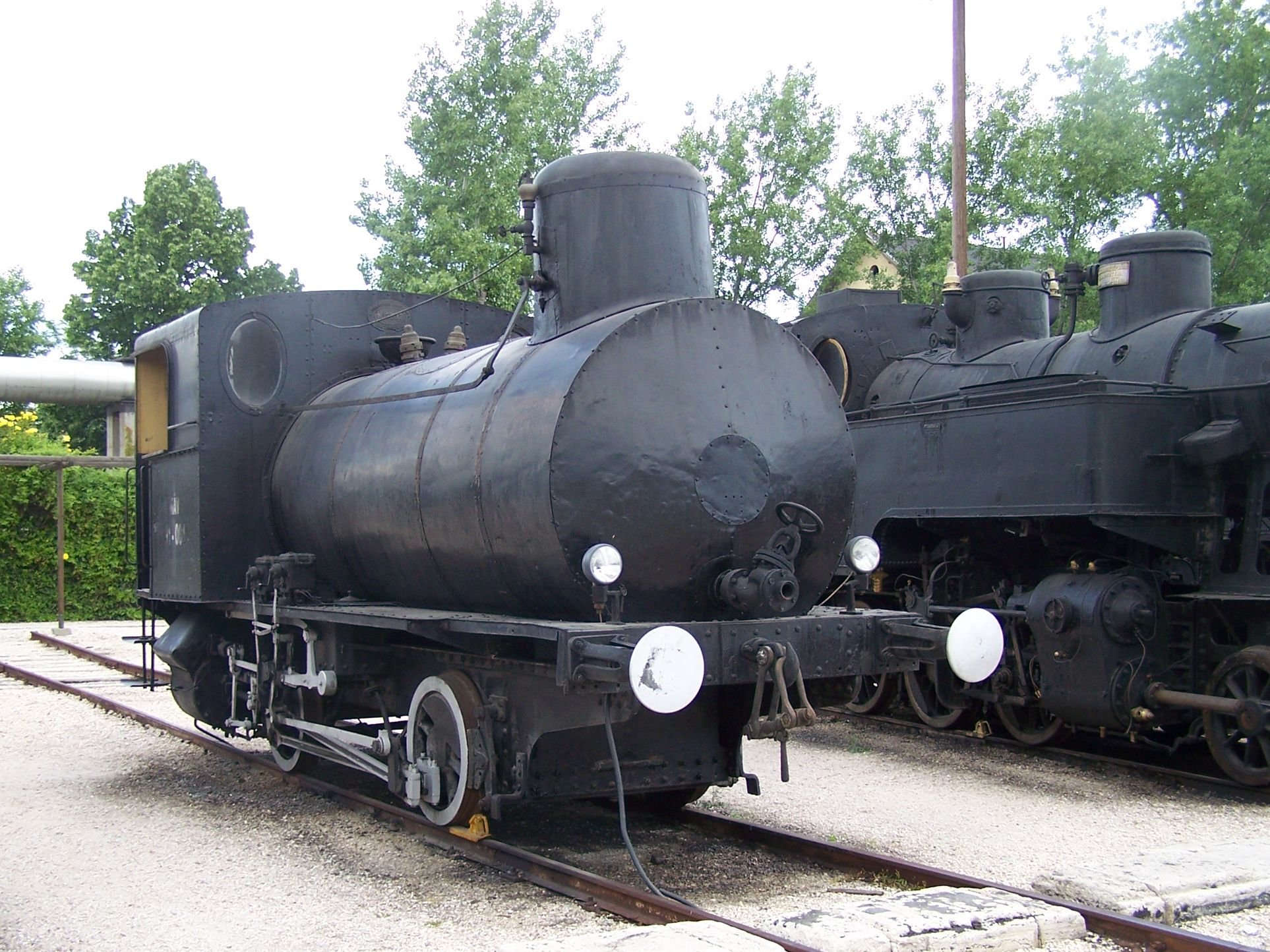 MÁV 91 a Füsti vasúttörténeti parkban